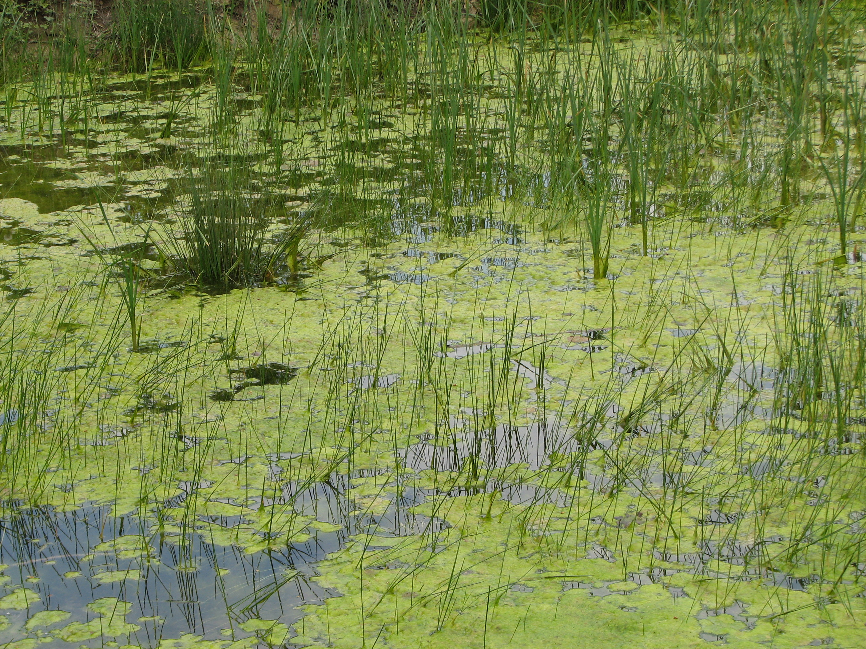 Kal v vasi Beka pri Kozini; Slovenija, Primorska